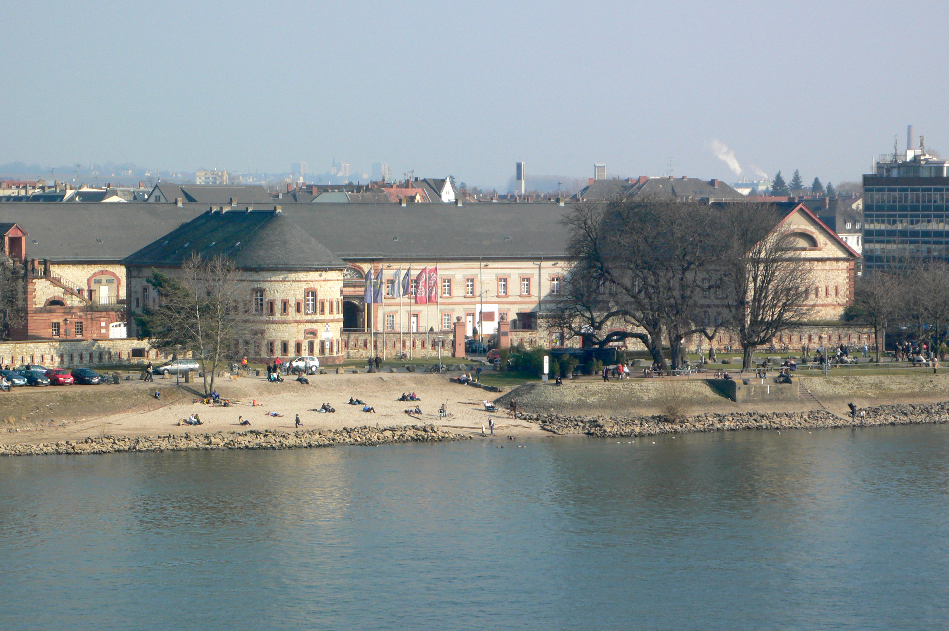 Die „Rundumverteidigungsanlage“ Reduit am Am Rheinufer in Mainz-Kastel. Sie wurde 1832 bis 1833 zur Sicherung der schwimmenden Brücke über den Rhein als Festung des Deutschen Bundes erbaut